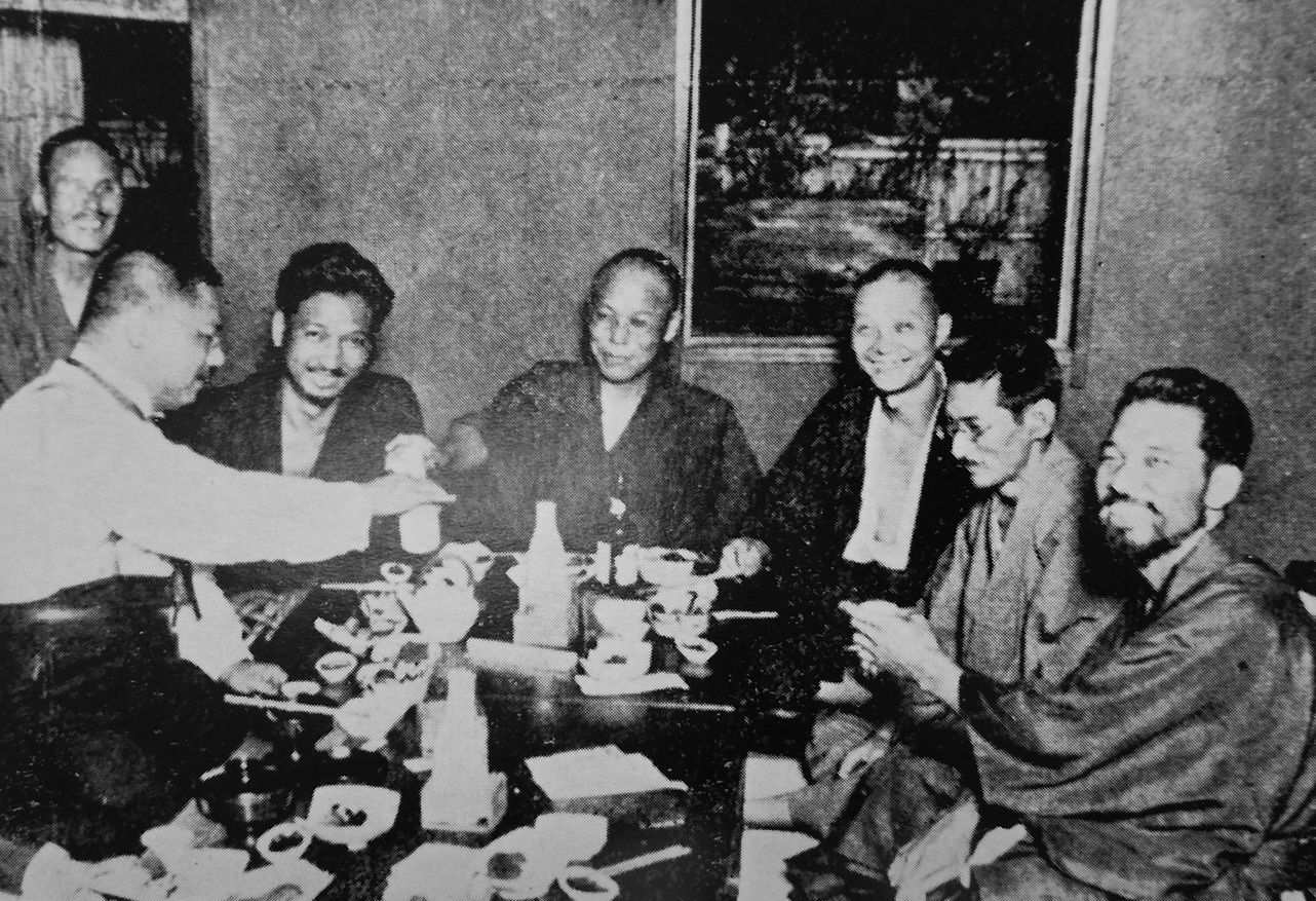 売文社の面々。左から、新居格（白シャツ）、大杉栄、堺利彦、山崎今朝弥、山川均、近藤栄蔵。左奥は不明。